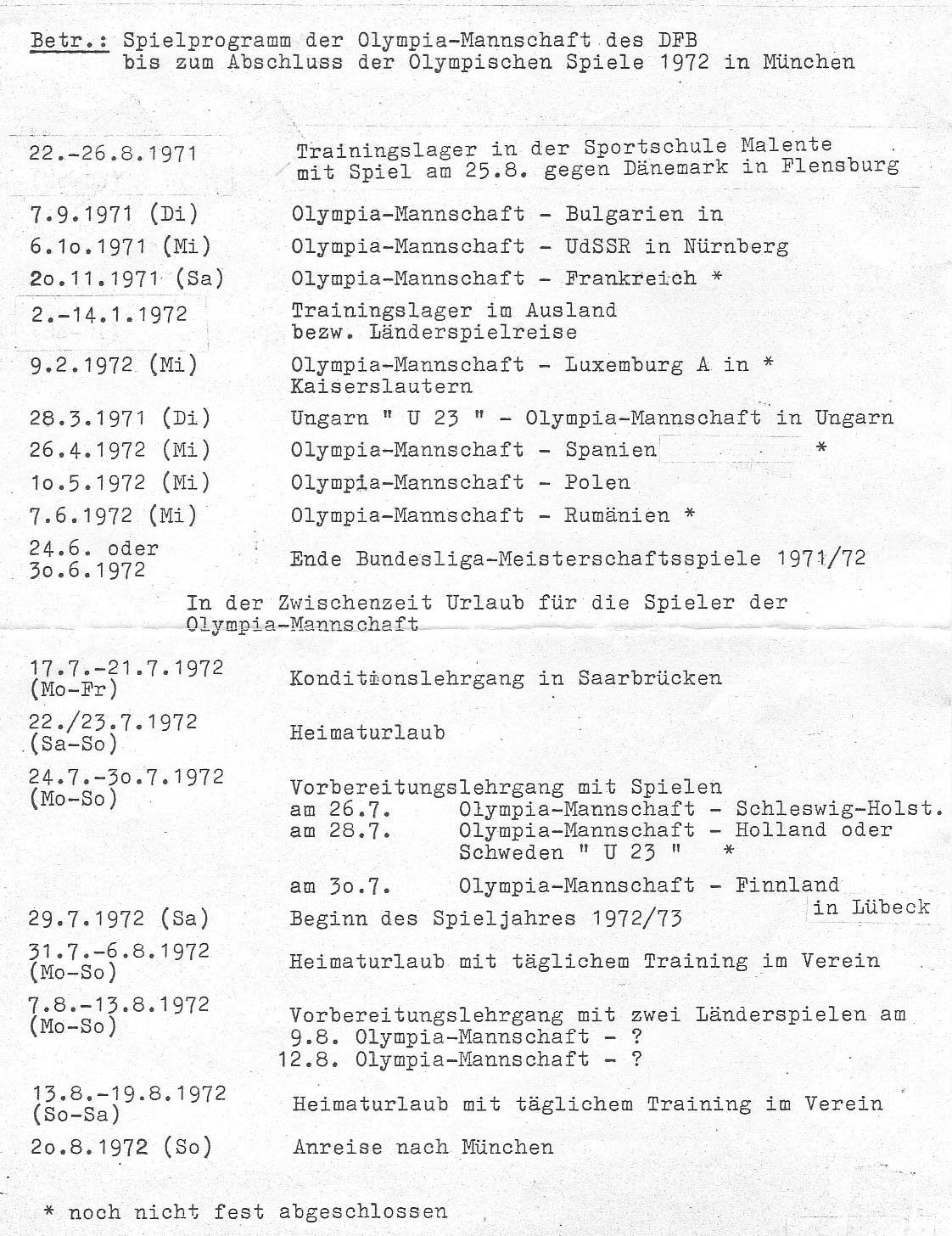 Spielprogramm der Fußball-Olympiamannschaft des DFBs 1972.